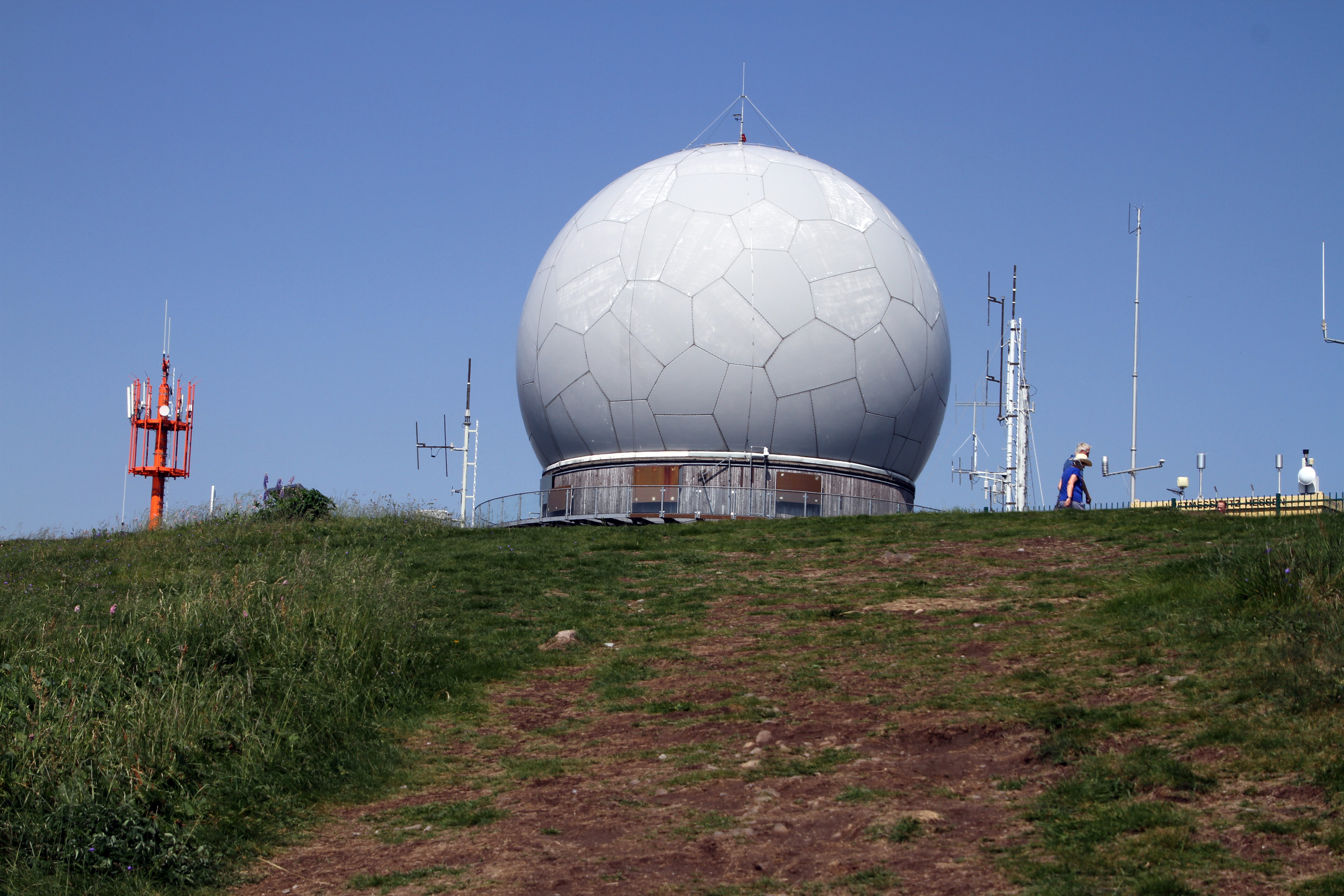 Wasserkuppe in der Rhön in Hessen